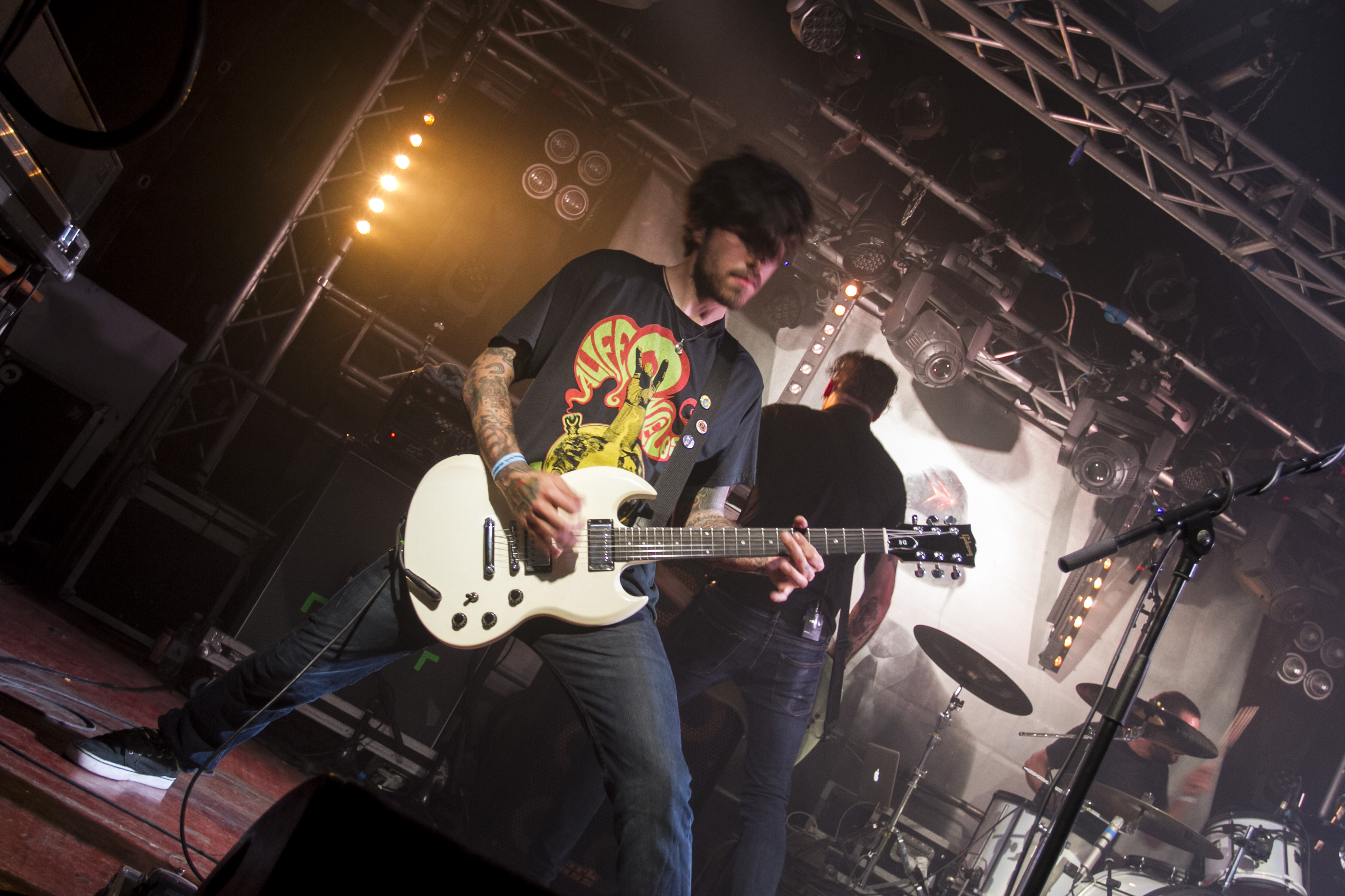 Paolo Paganelli (Segrate, Circolo Magnolia)